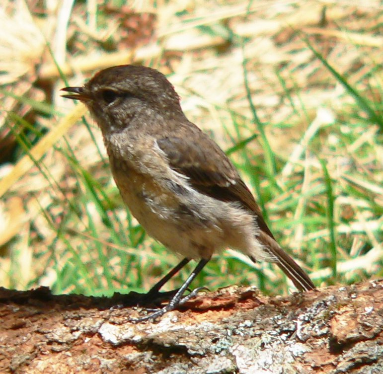 female Saxicola tectes ♀ sentier de la Roche Écrite, Île de la Réunion